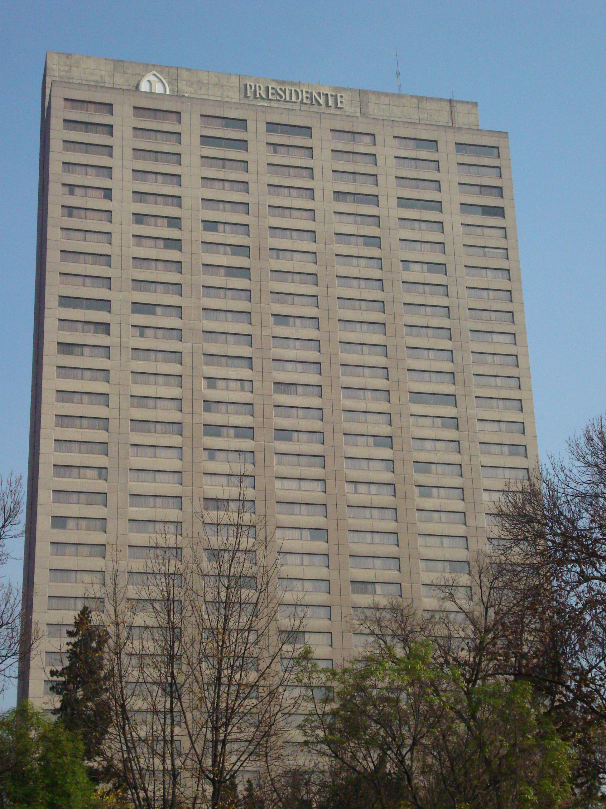 Hotel PresidenteIntercontinental en Polanco, en la Ciudad de México.